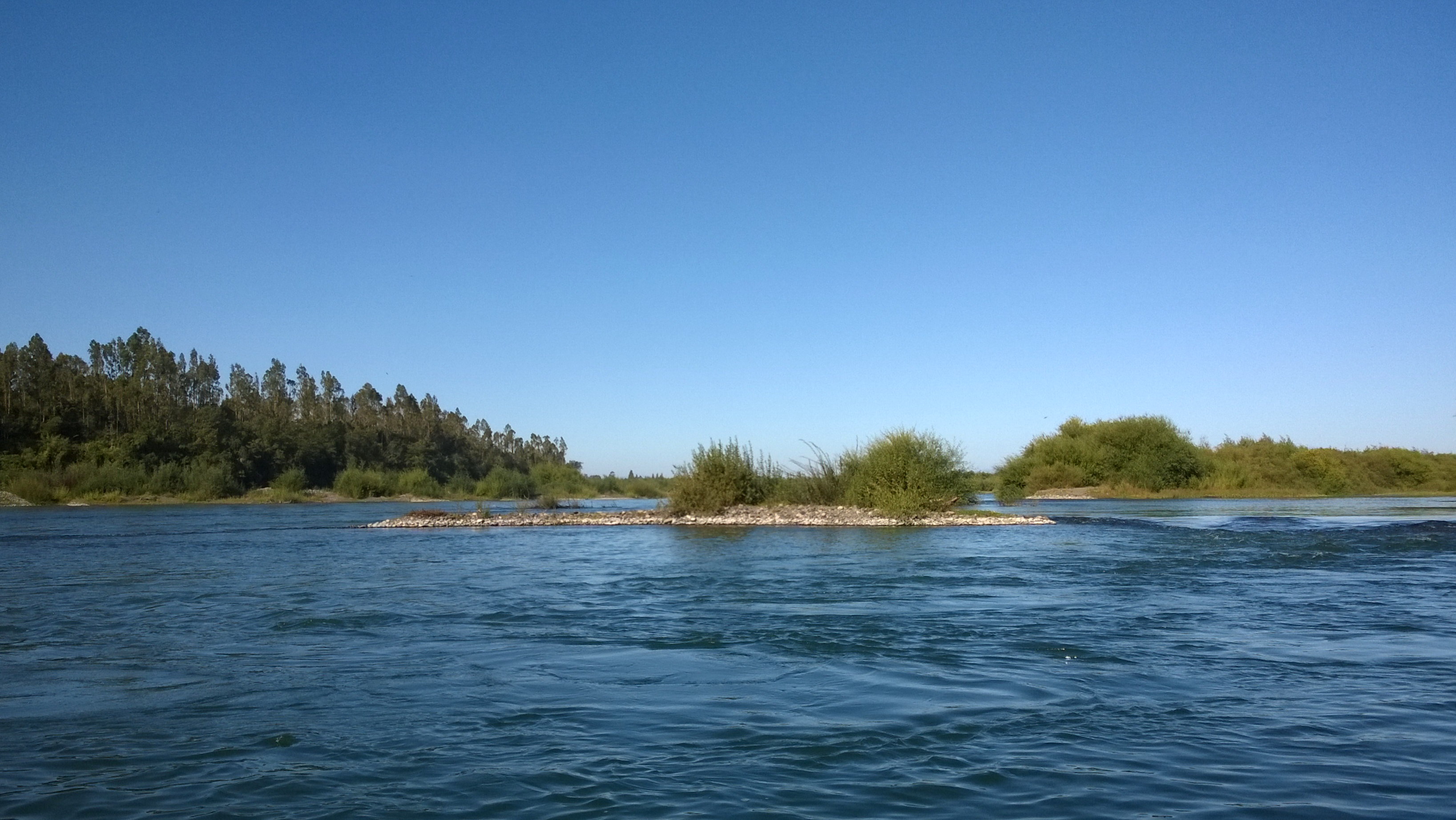 Vista del río donde puede observarse el color de sus aguas